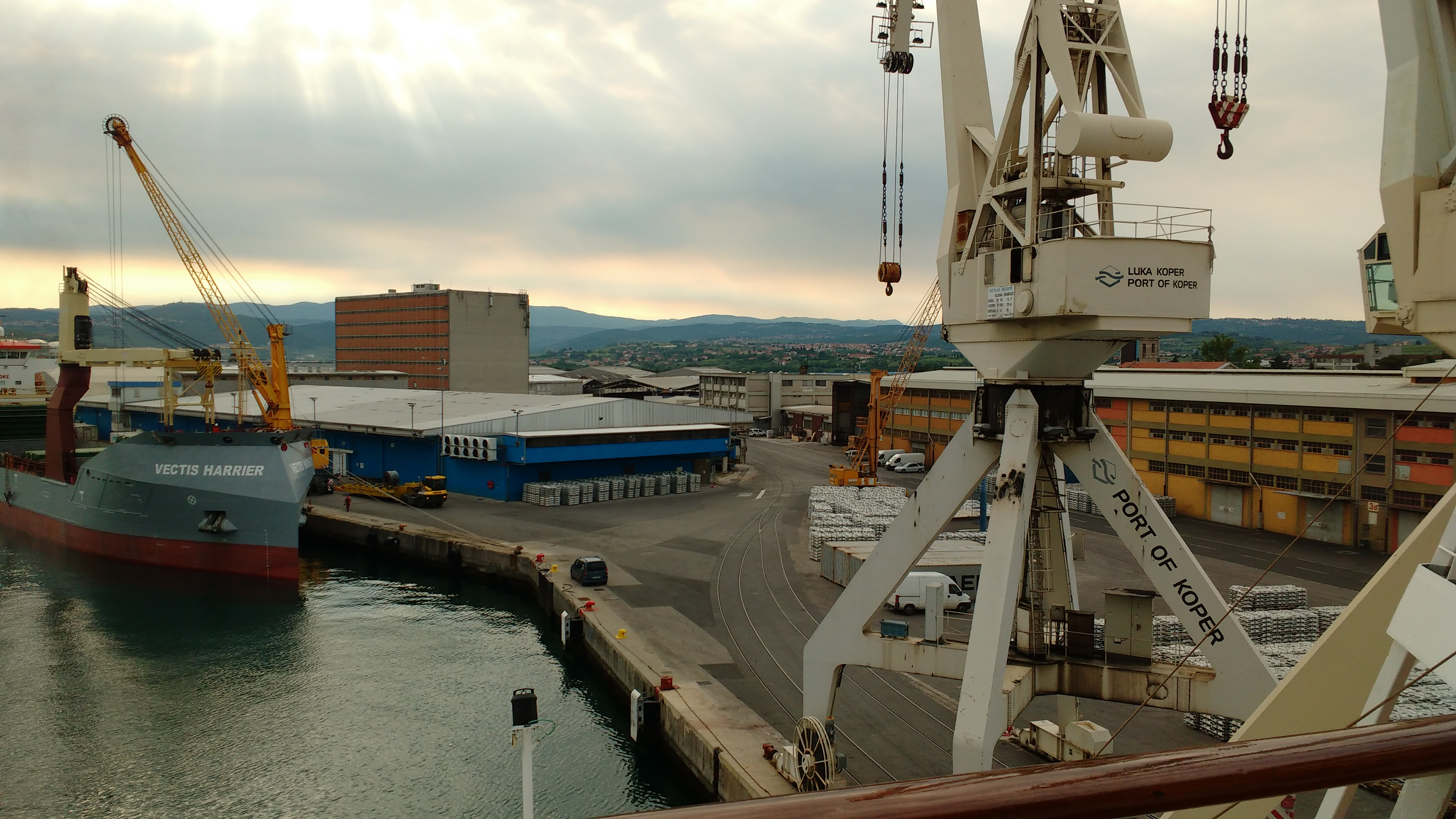 Cruzeiro MSC Sinfonia, Mar Adriático 2